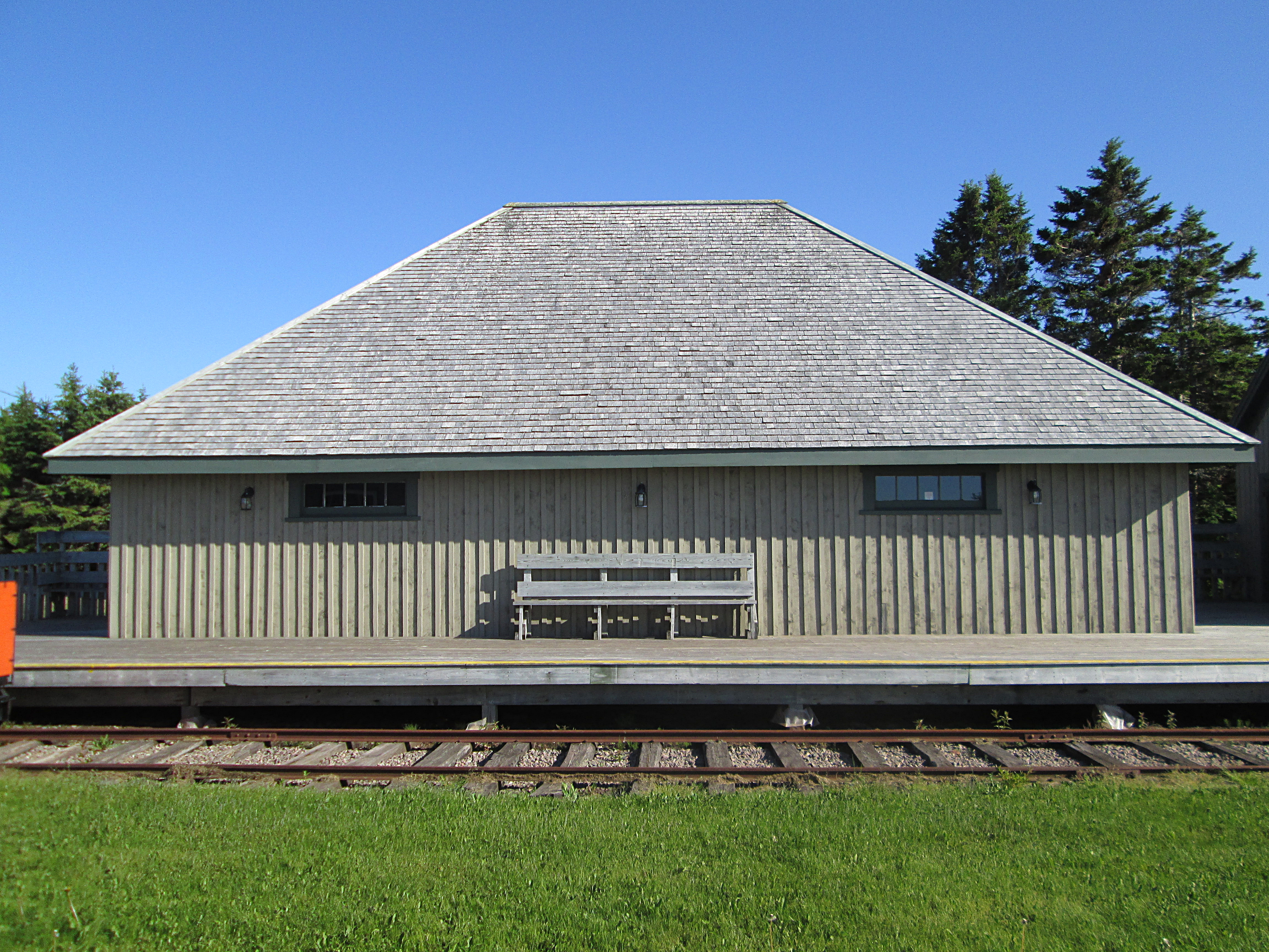 June 23, 2014